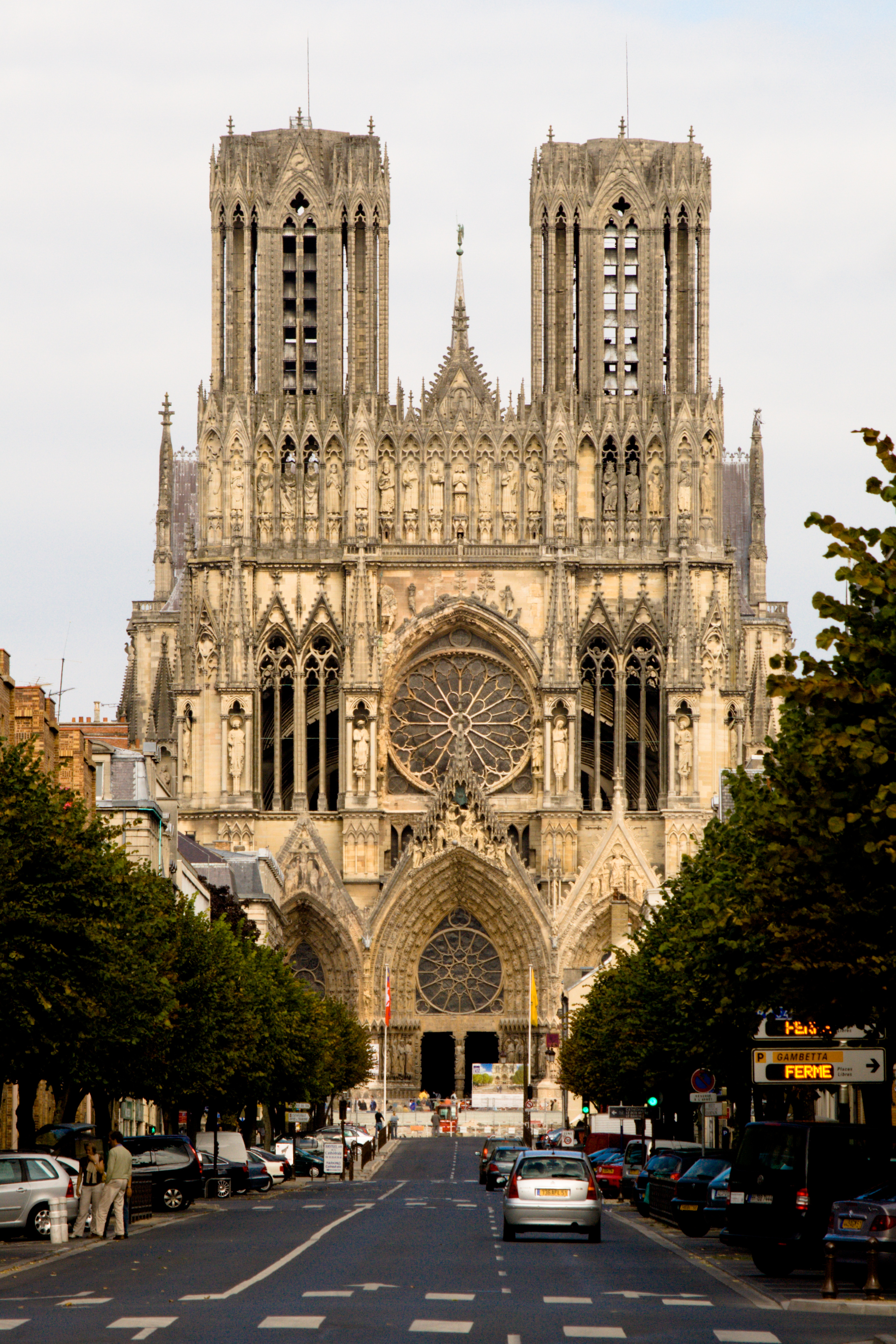 Facade de la Cathédrale de Reims, prise depuis le bout de l'avenue Libergier